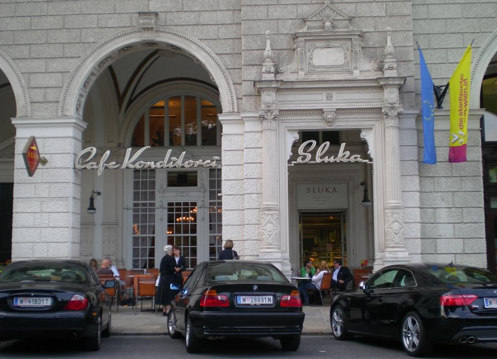 Die Cafe-Konditorei Sluka im 1. Wiener Gemeindebezirk